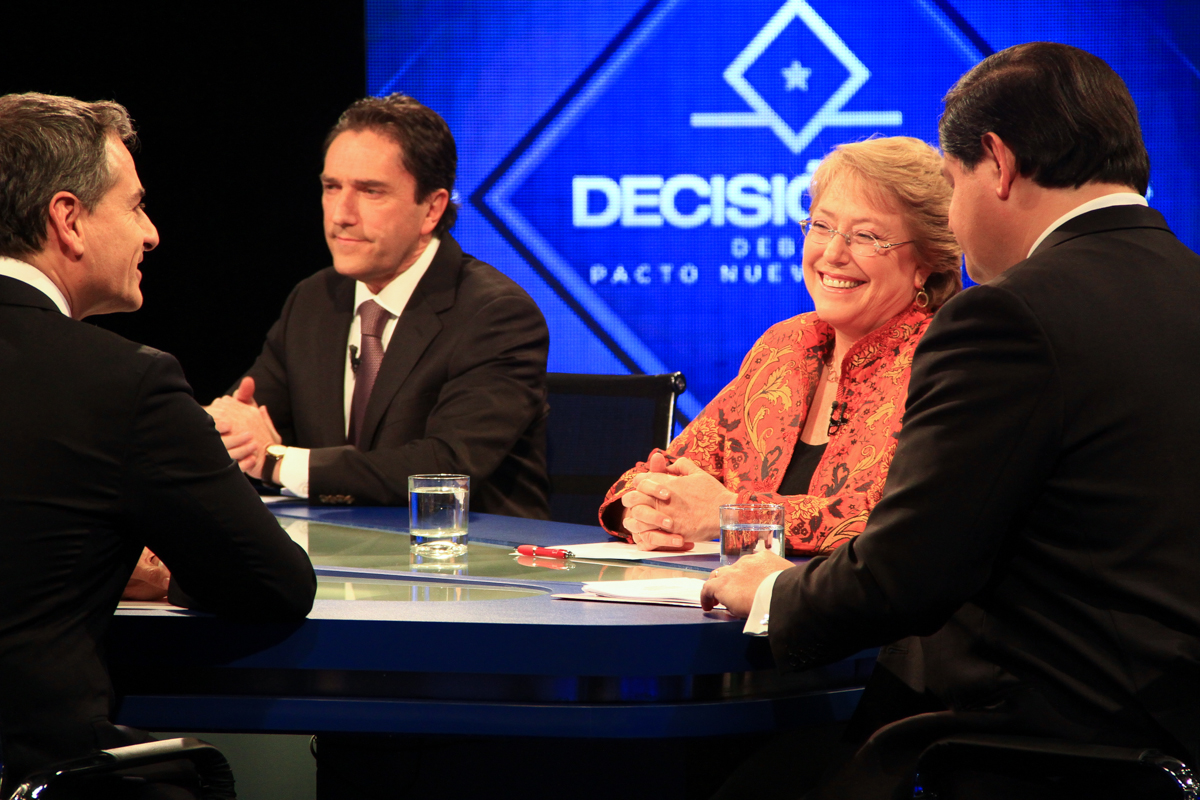 Debate primarias Nueva Mayoría, 23 de junio de 2013.